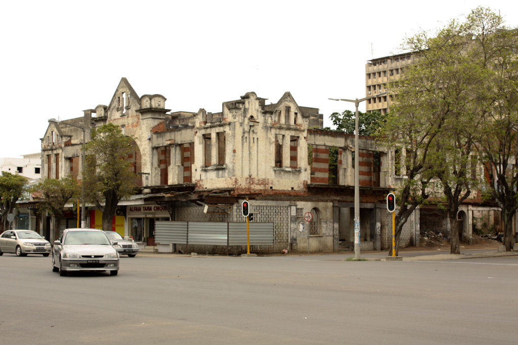 Avenida Buildings (1905)